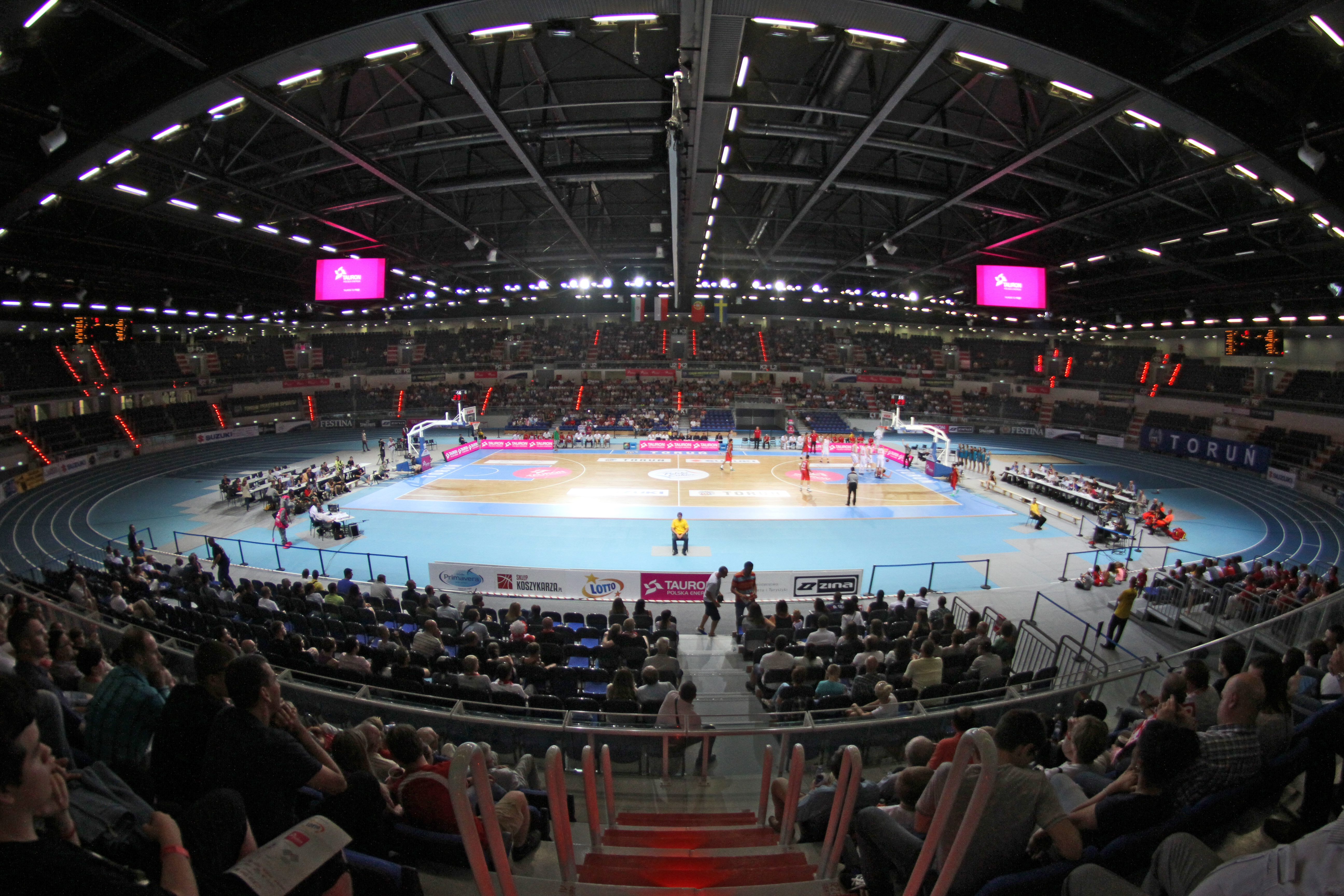 Toruń Basket Cup: Polska - Portugalia, 1 sierpnia 2014. Hala Sportowo-Widowiskowa w Toruniu podczas meczu reprezentacji Polski w koszykówce